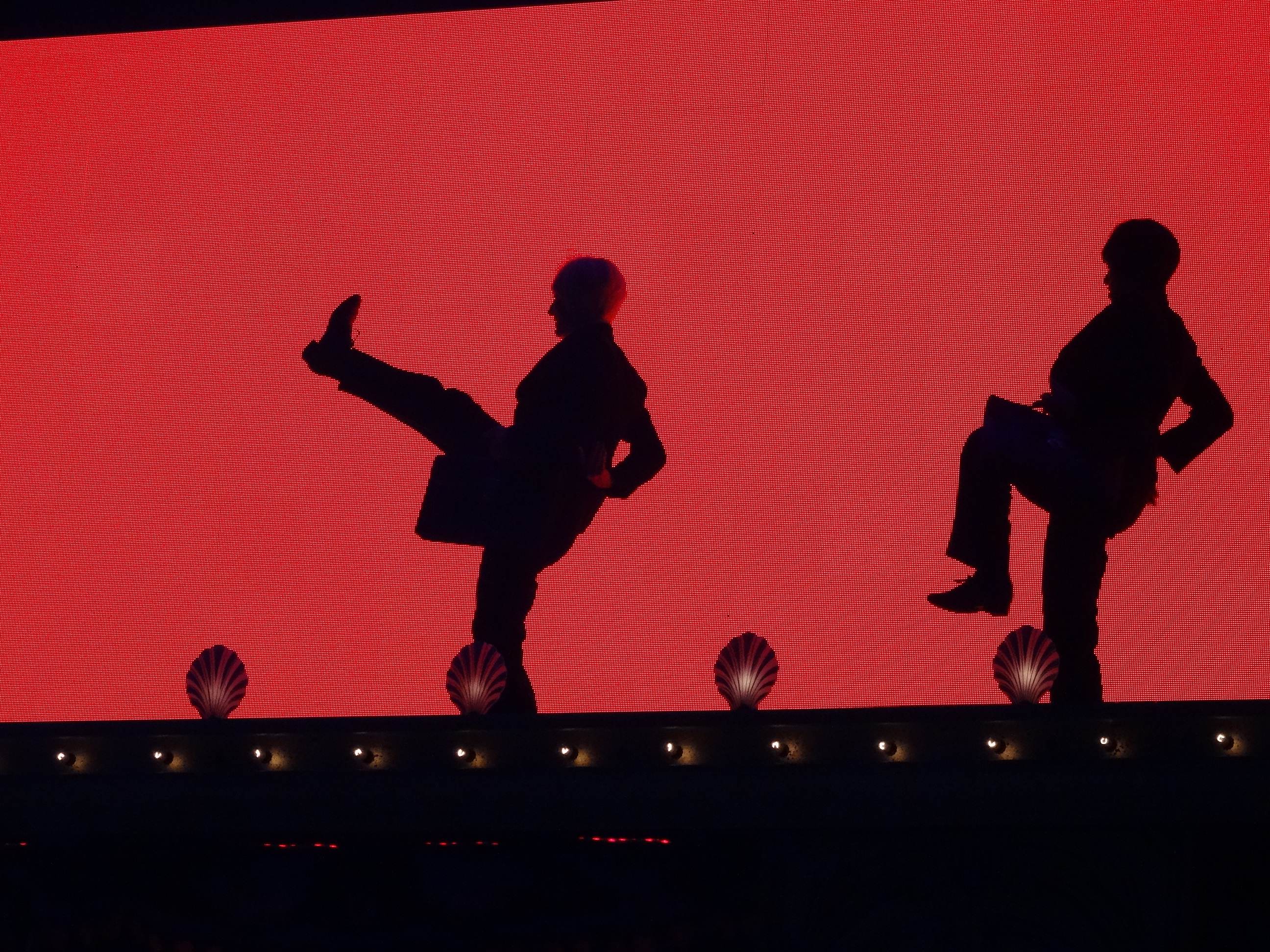 Photo 02-07-14 12 56 41